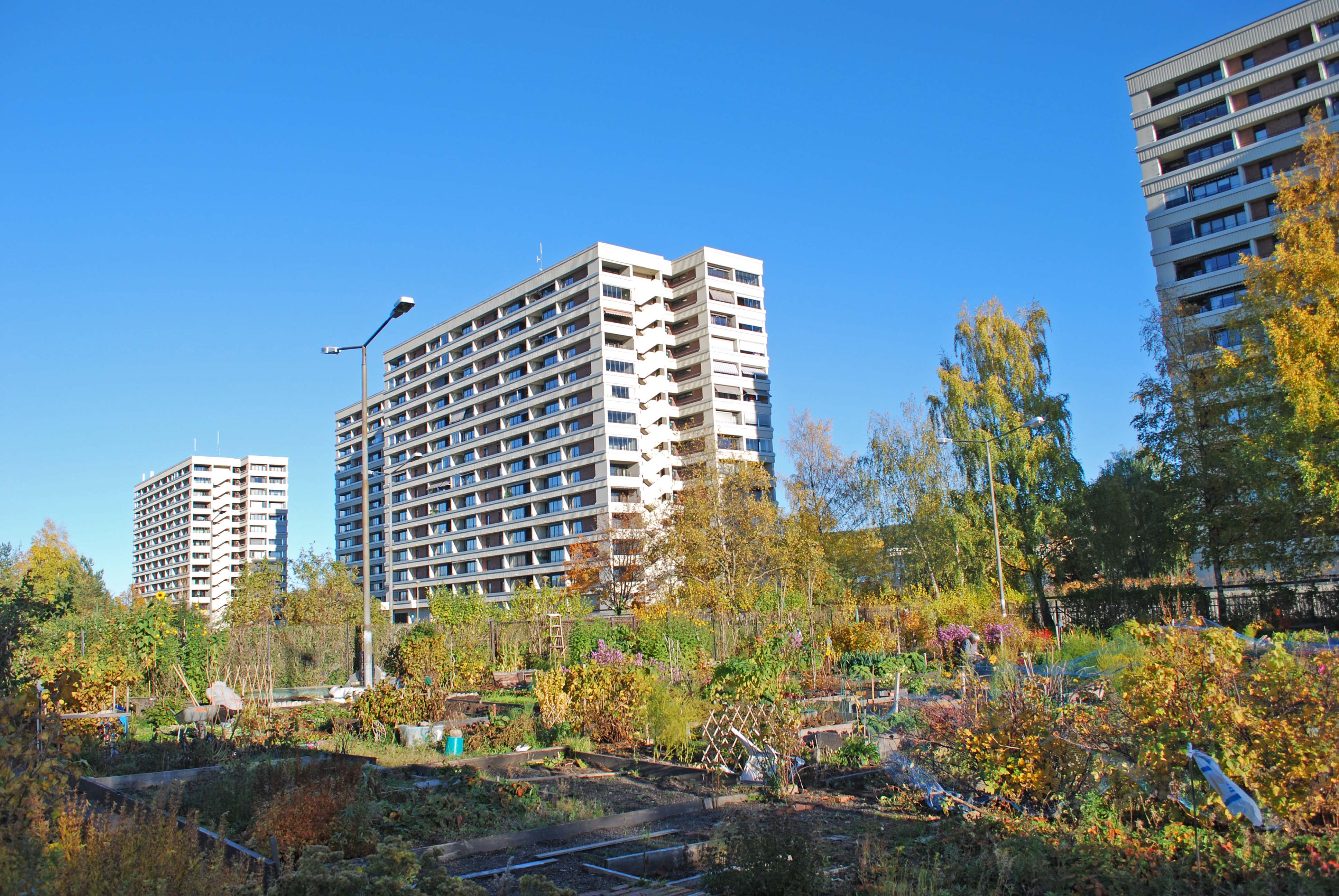 Parsellhager i Tveitaparken, Tveita, Oslo. Nåkkves vei 3 til 11 i bakgrunnen.